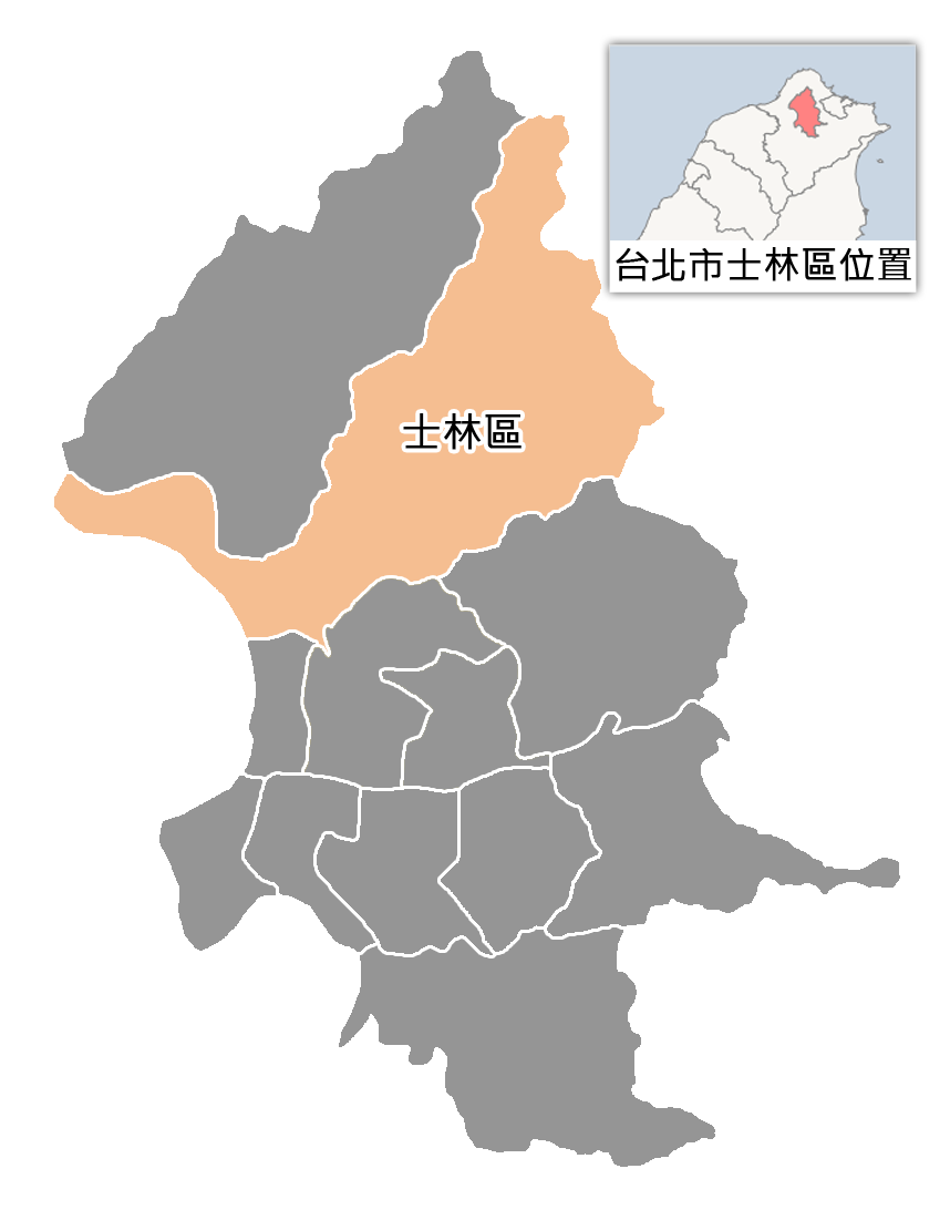 台北市士林區位置